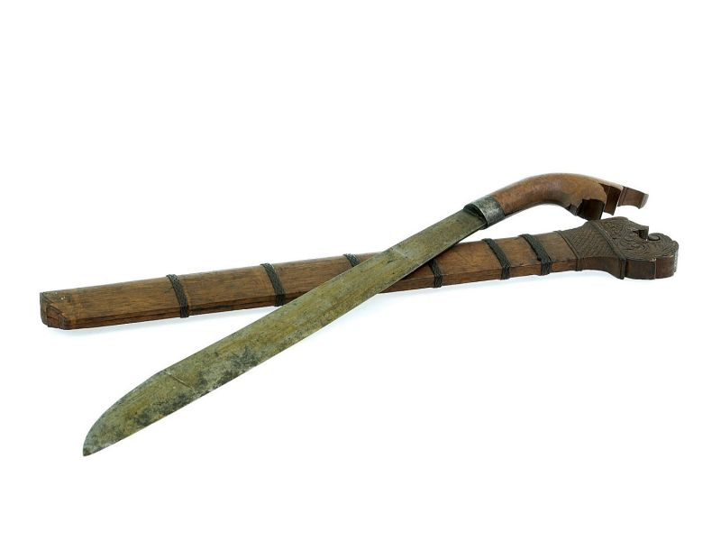 Mes. Kapmes met houten greep en houten schede